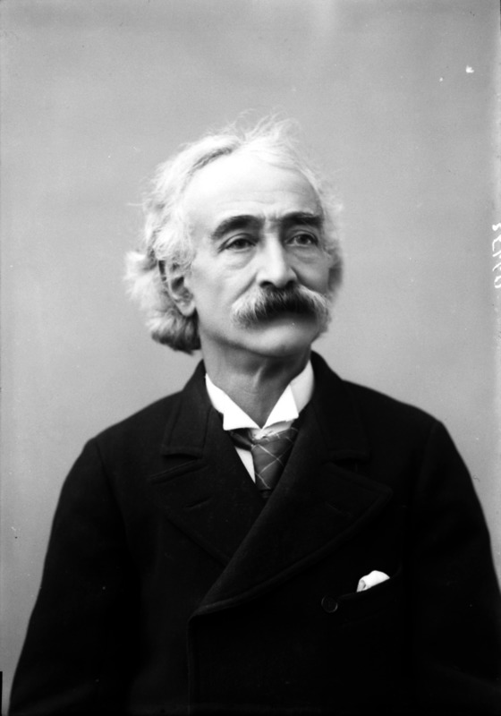 Federico Consolo fotografato da Mario Nunes Vais